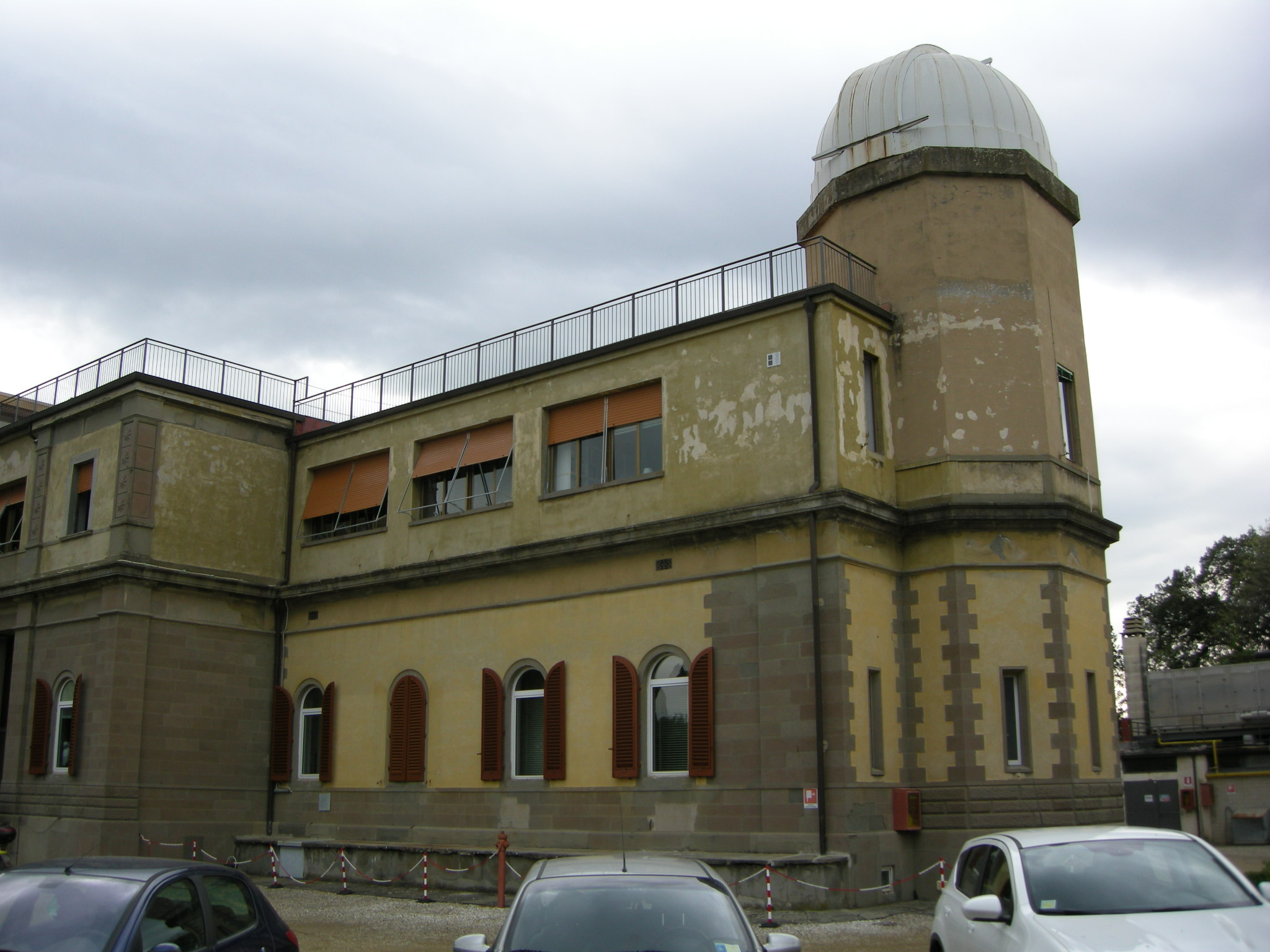 Osservatorio di arcetri, istituto